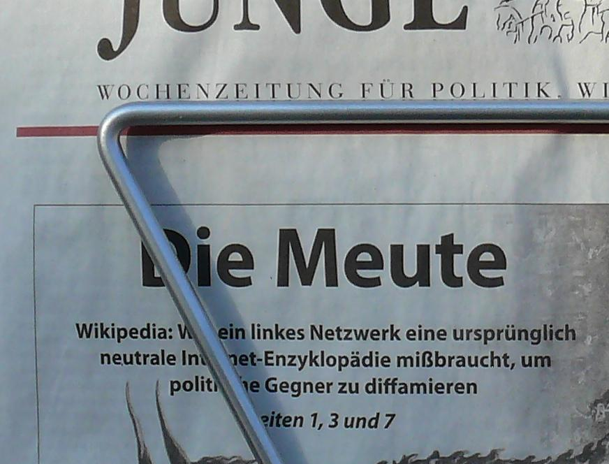 die Zeitung Junge Freiheit kritisiert die Wikipedia im Juni 2011